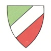 Farben der Studentenverbindung Selonia zu Riga